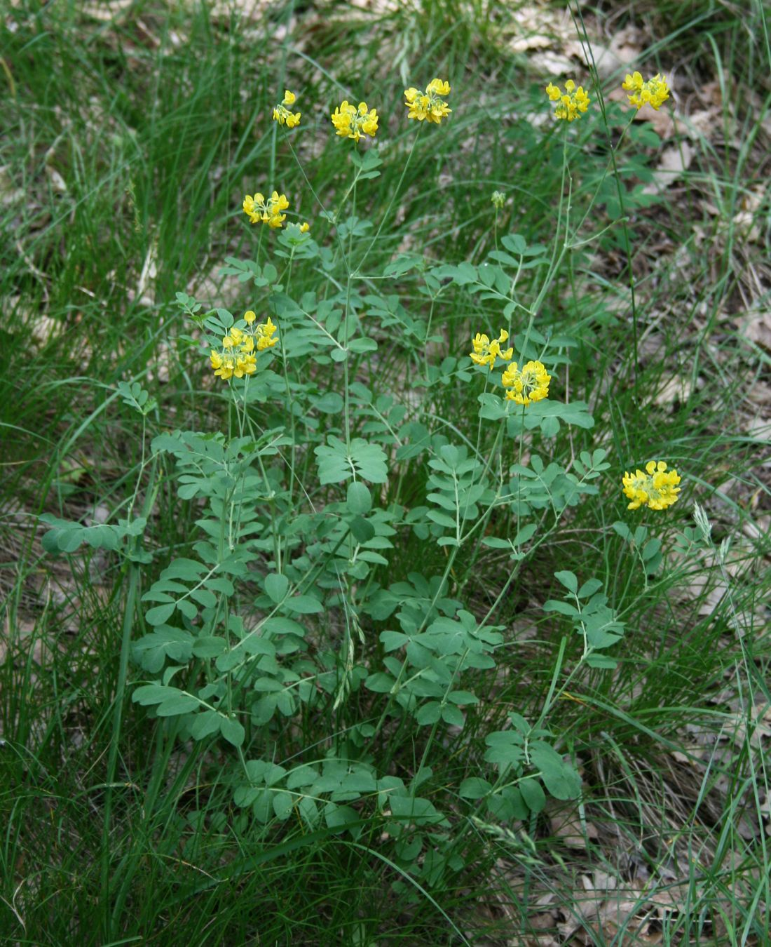 Berg-Kronwicke (Coronilla coronata), Hülsenfrüchtler (Fabaceae), Schmetterlingsblütler (Faboideae) - Ungarn/Magyarország/Hungary: Pest megye, Szénás-Hügel bei Pilisszentiván